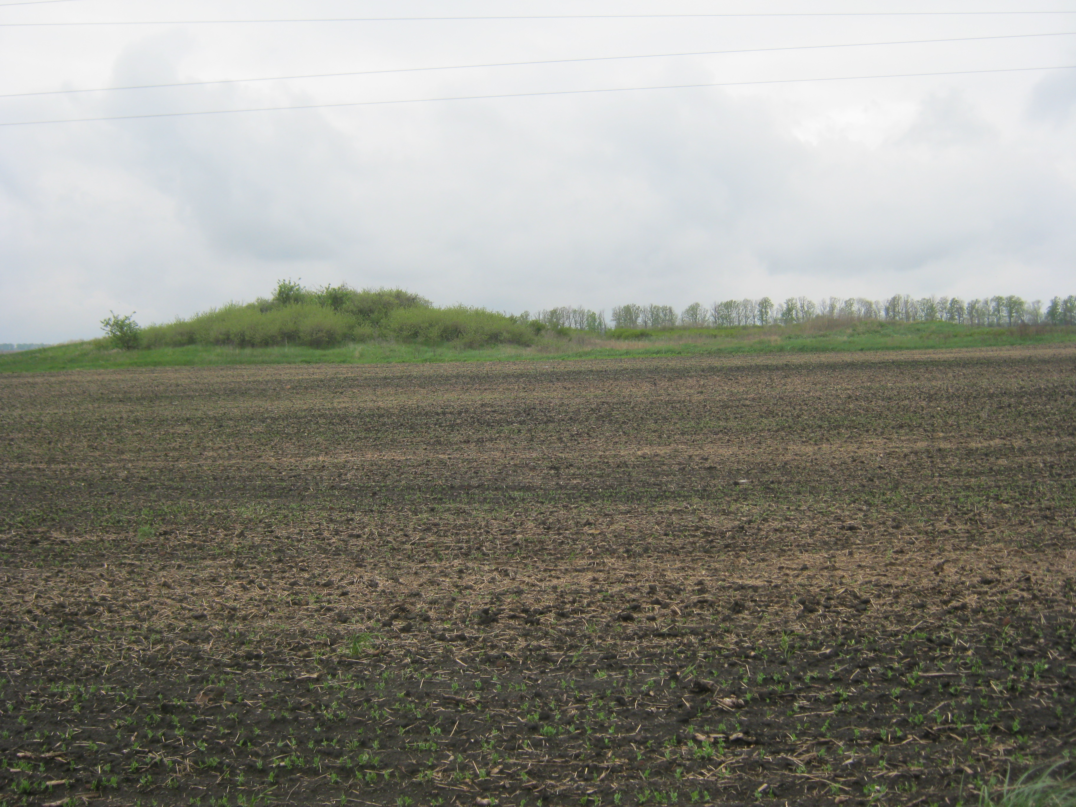 Кургани. 20., Одрадове